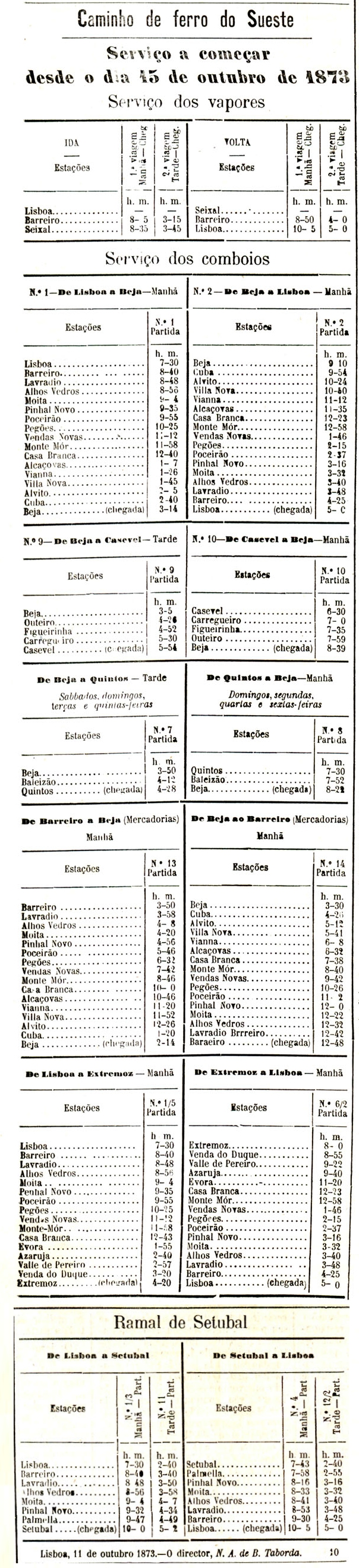 Horários do Caminho de Ferro do Sueste, divisão do governo Português que explorava os comboios do Alentejo até à Margem Sul do Rio Tejo, e os navios a vapor desde a Margem Sul até Lisboa. Esta imagem foi publicada no Diario Illustrado n.º 429, de 15 de Outubro de 1873, e digitalizada pela Biblioteca Nacional de Portugal.